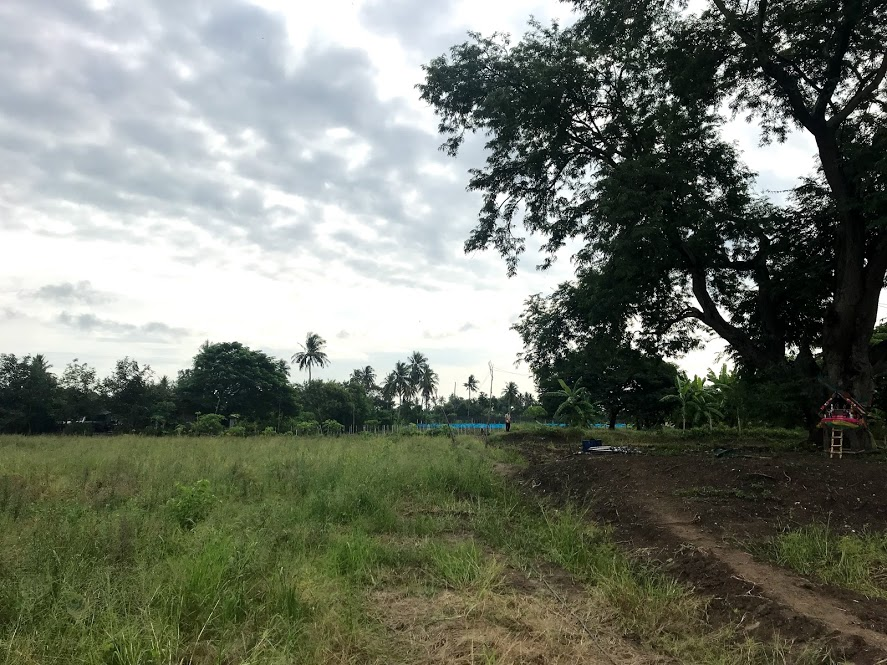 หมู่บ้านทุ่งวาวดาวเรือง